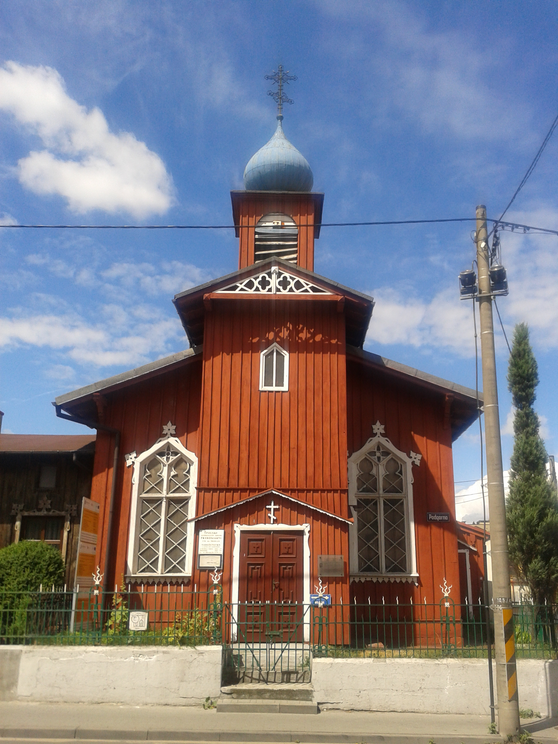 Polski Autokefaliczny Kościół Prawosławny - Parafia Św. Mikołaja w Toruniu ulica Podgórna 45